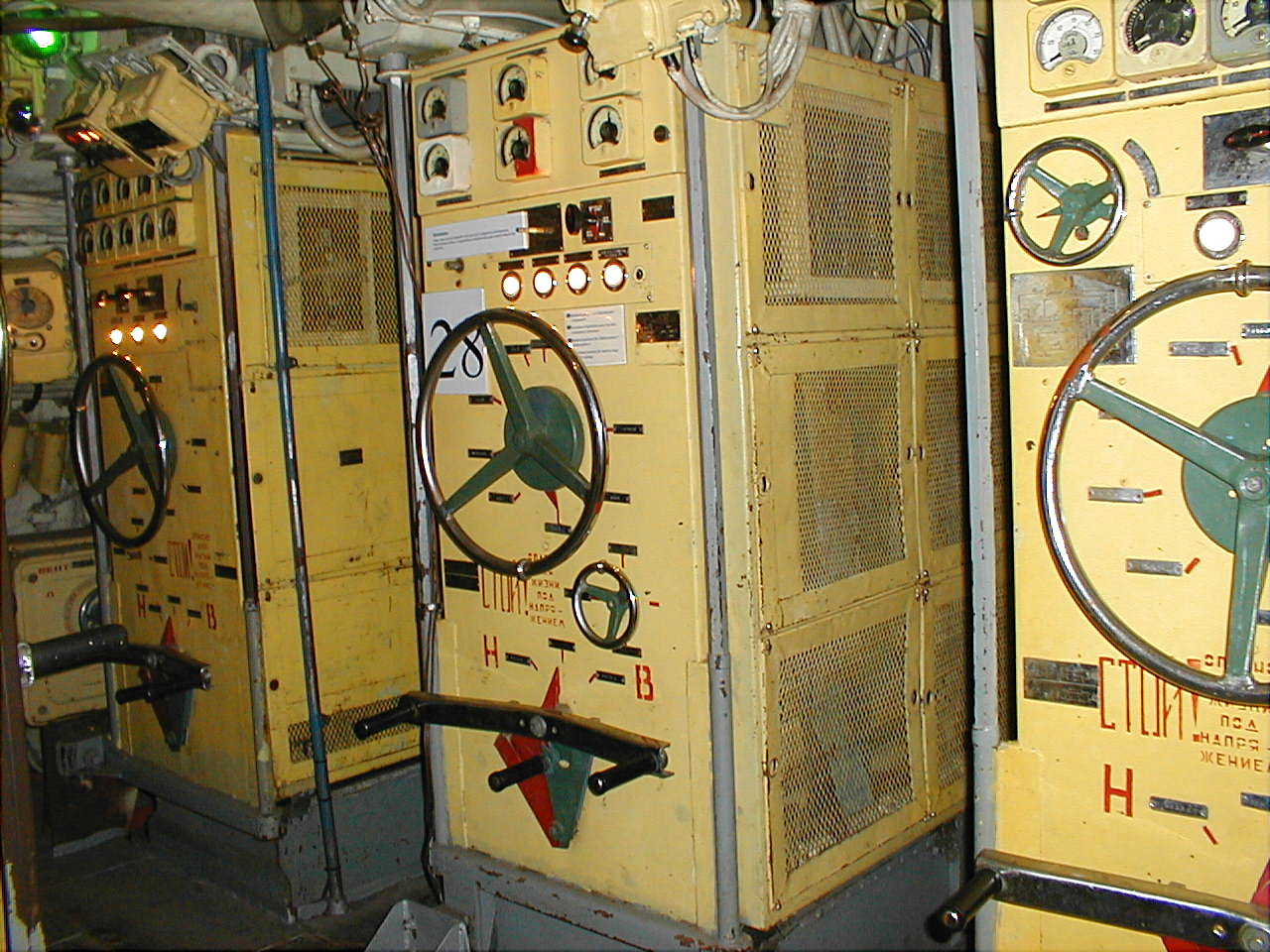 Sous marin conventionnel Russe de classe FoxTrot ici FoxTrot 480 servant de musée et amarré à Zeebruges